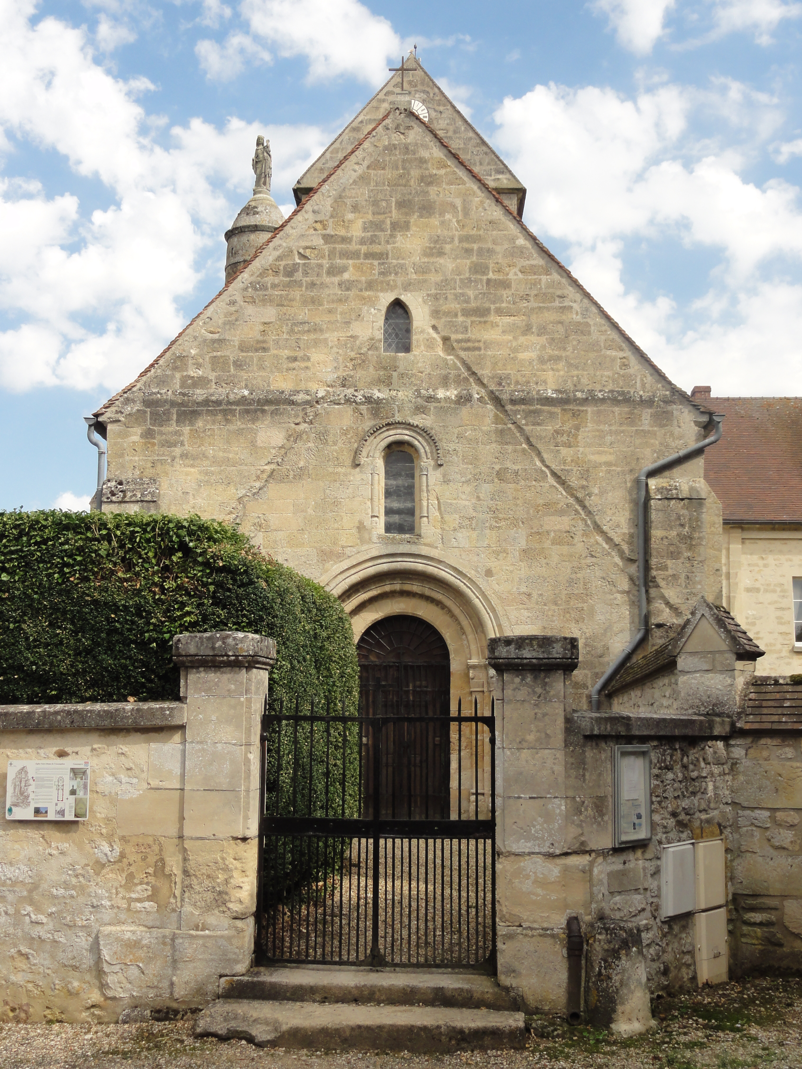 Église Notre-Dame-de-l'Assomption de Gouzangrez - voir titre.